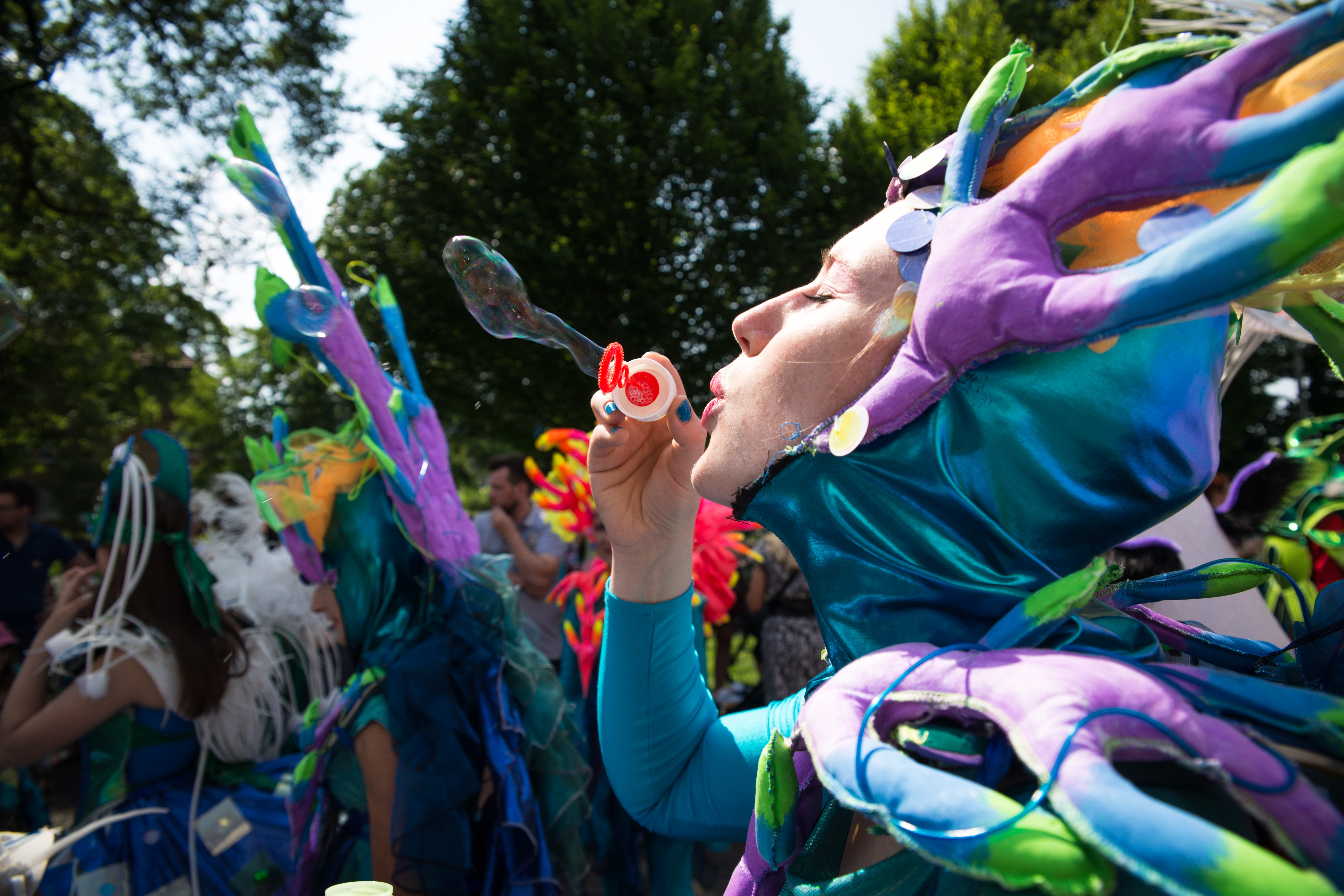 Photo by: Joachim Müller